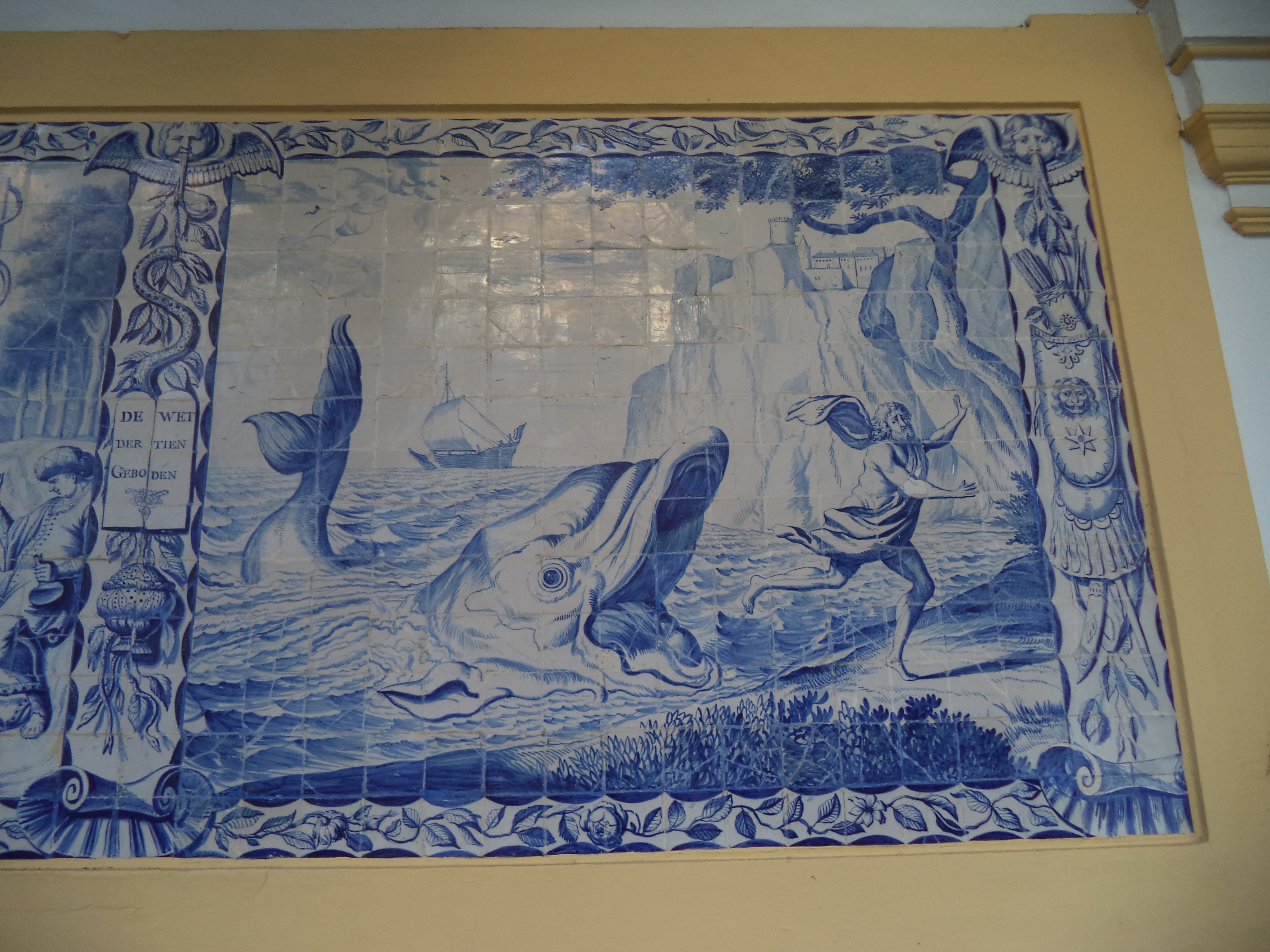 La ballena escupe a Jonás en la costa. Imagen en cerámica en un muro del Hospital de la Caridad de Sevilla